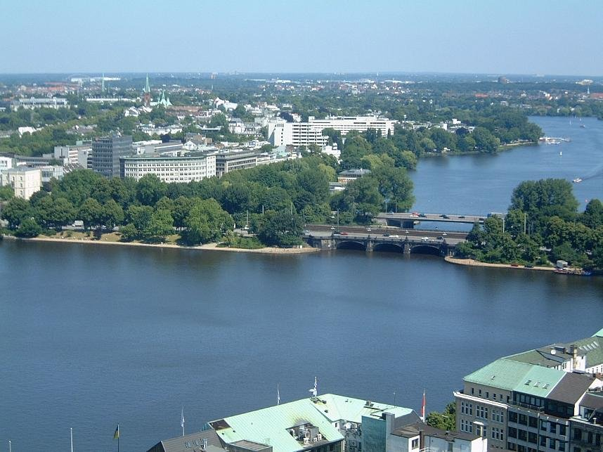 Lombardsbrücke mit Binnen- und Außenalster von St.Petri This is a photograph of an architectural monument.